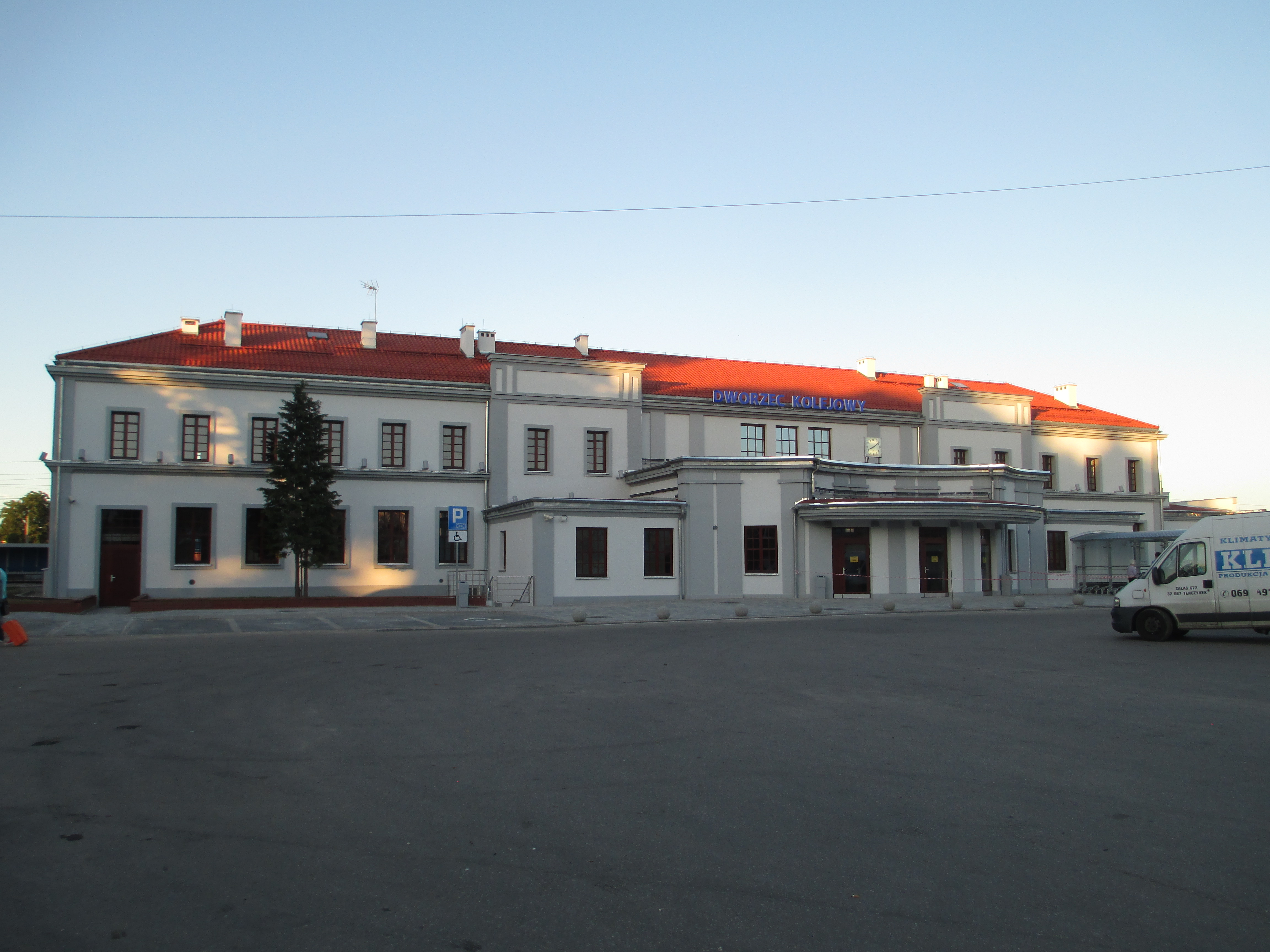 Ełk - dworzec kolejowy po renowacji 2014